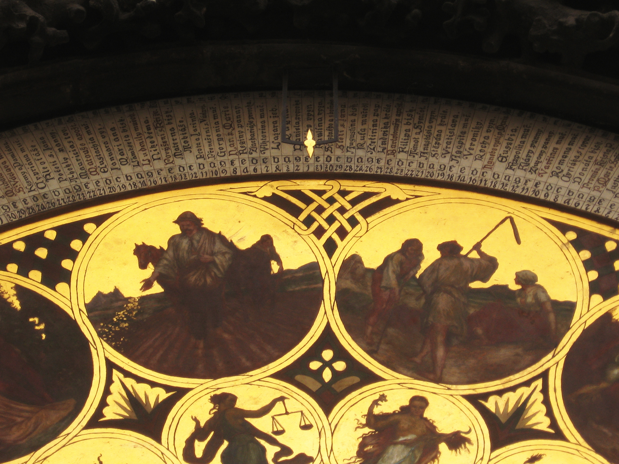 Prague Clock, calendar - detail, it shows date 1st September (although the real date was August 31st). Detail kalendáře z 19. století pod astronomickou částí pražského orloje. Kalendář ukazuje datum 1. září (i když ve skutečnosti byl 31. srpen).